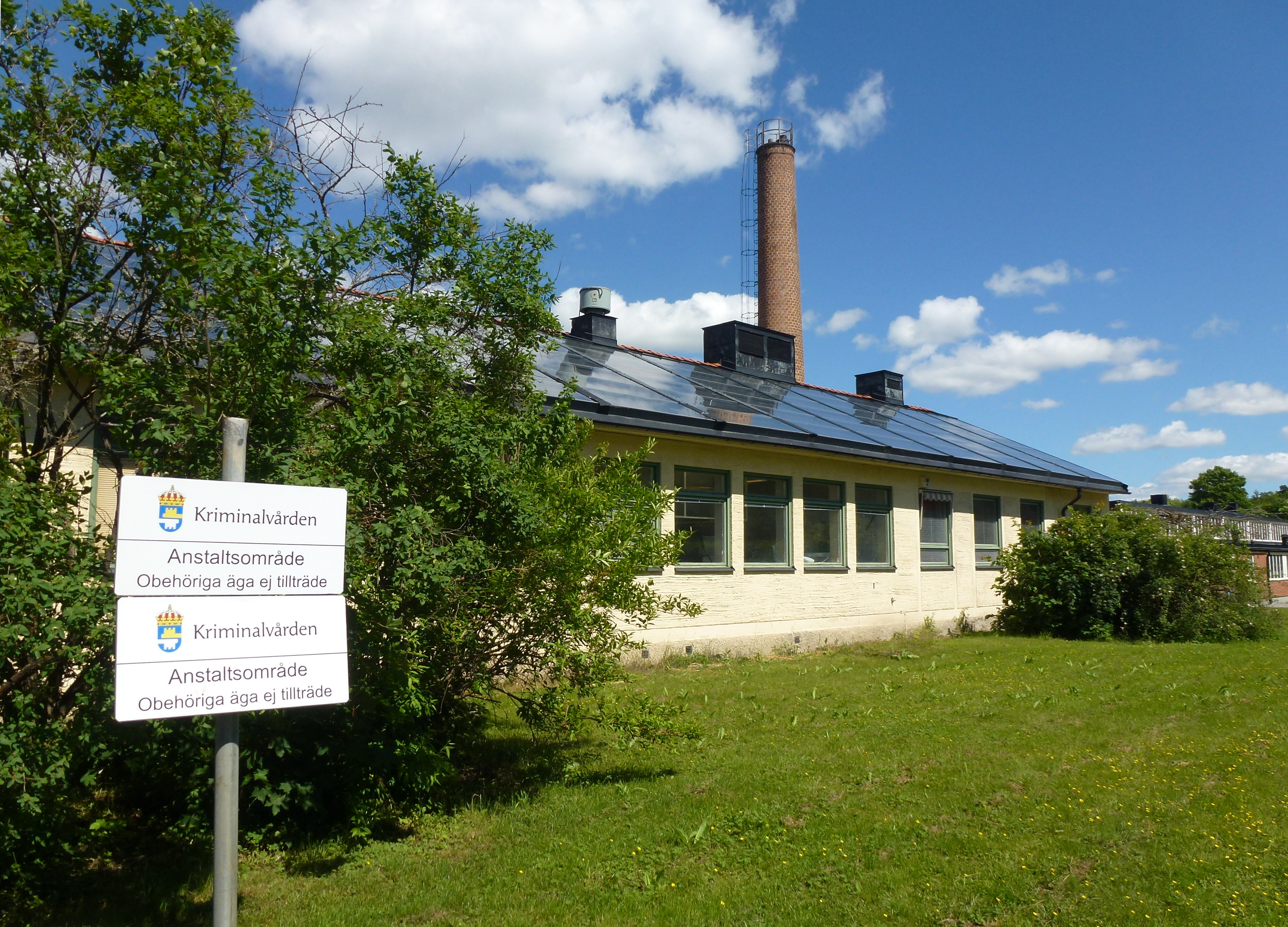 Svartsjöanstalten